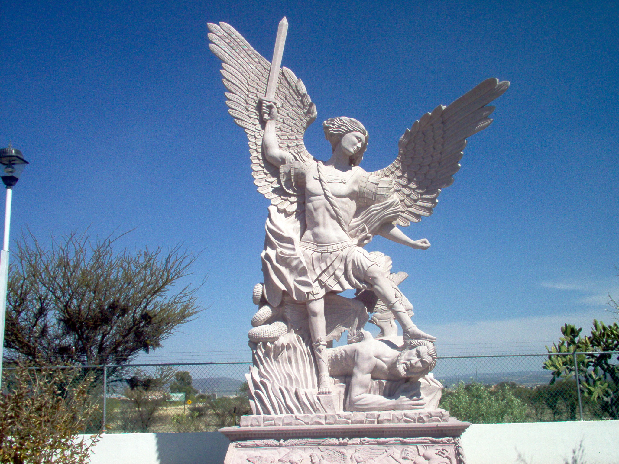 Escultura de San Miguel el Alto